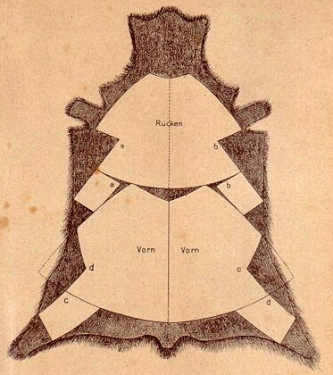 Graphics for Furriers :Russische Ziege zu Kutscherkragen